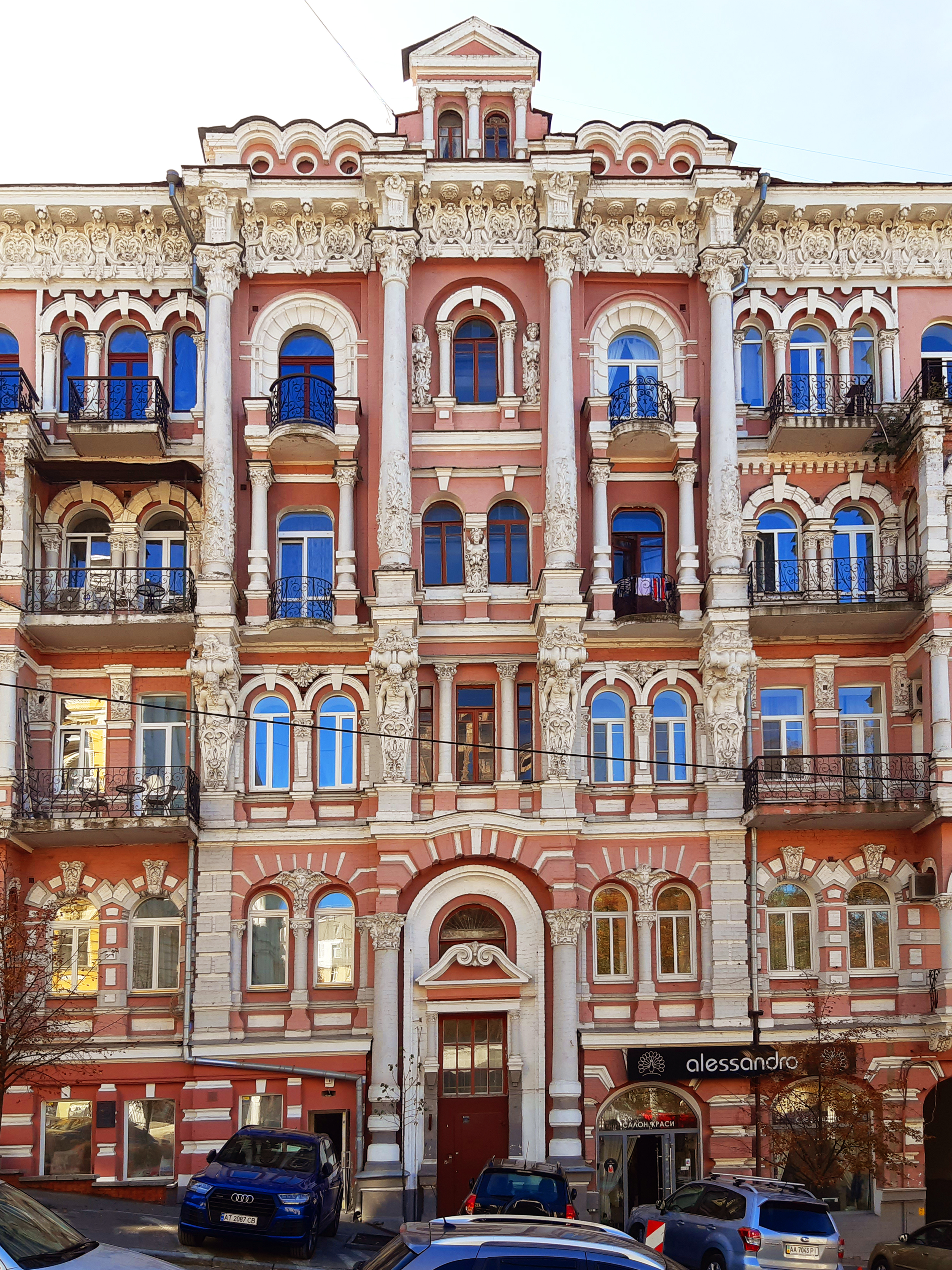 Будинок Майкапар, Лютеранська вул., 6. Київ